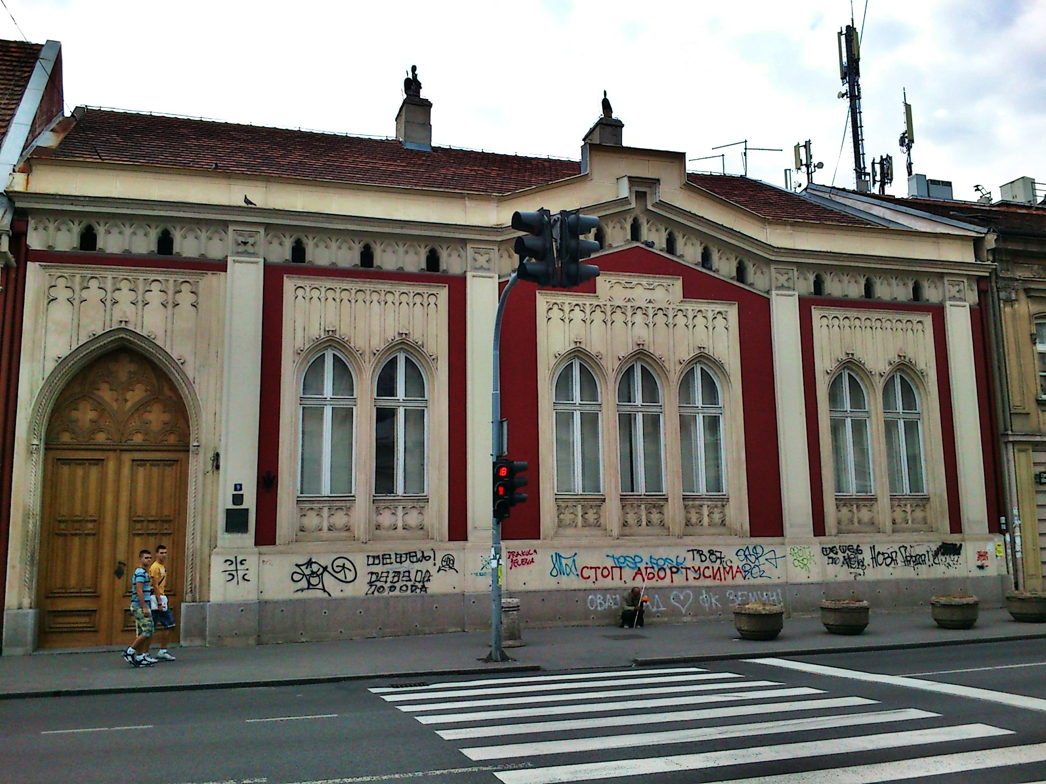 Шпиртина кућа